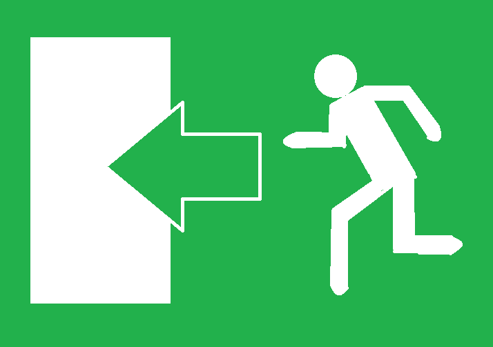 Señal de rutas de evacuacion